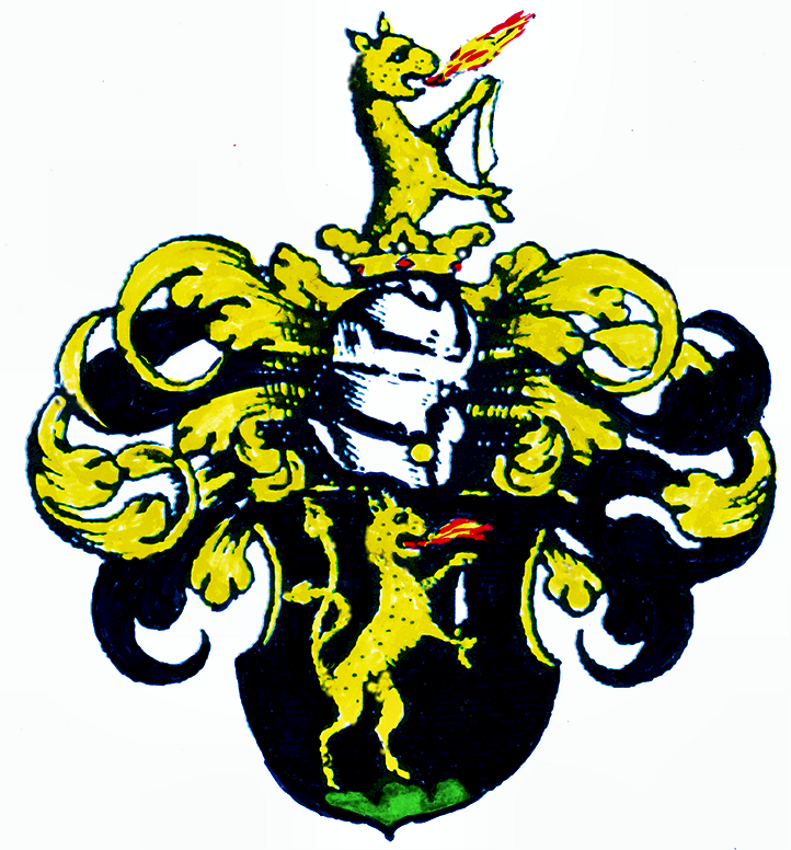 Stammwappen der späterem Freiherren Mayerhofer von Grünbühel 1636